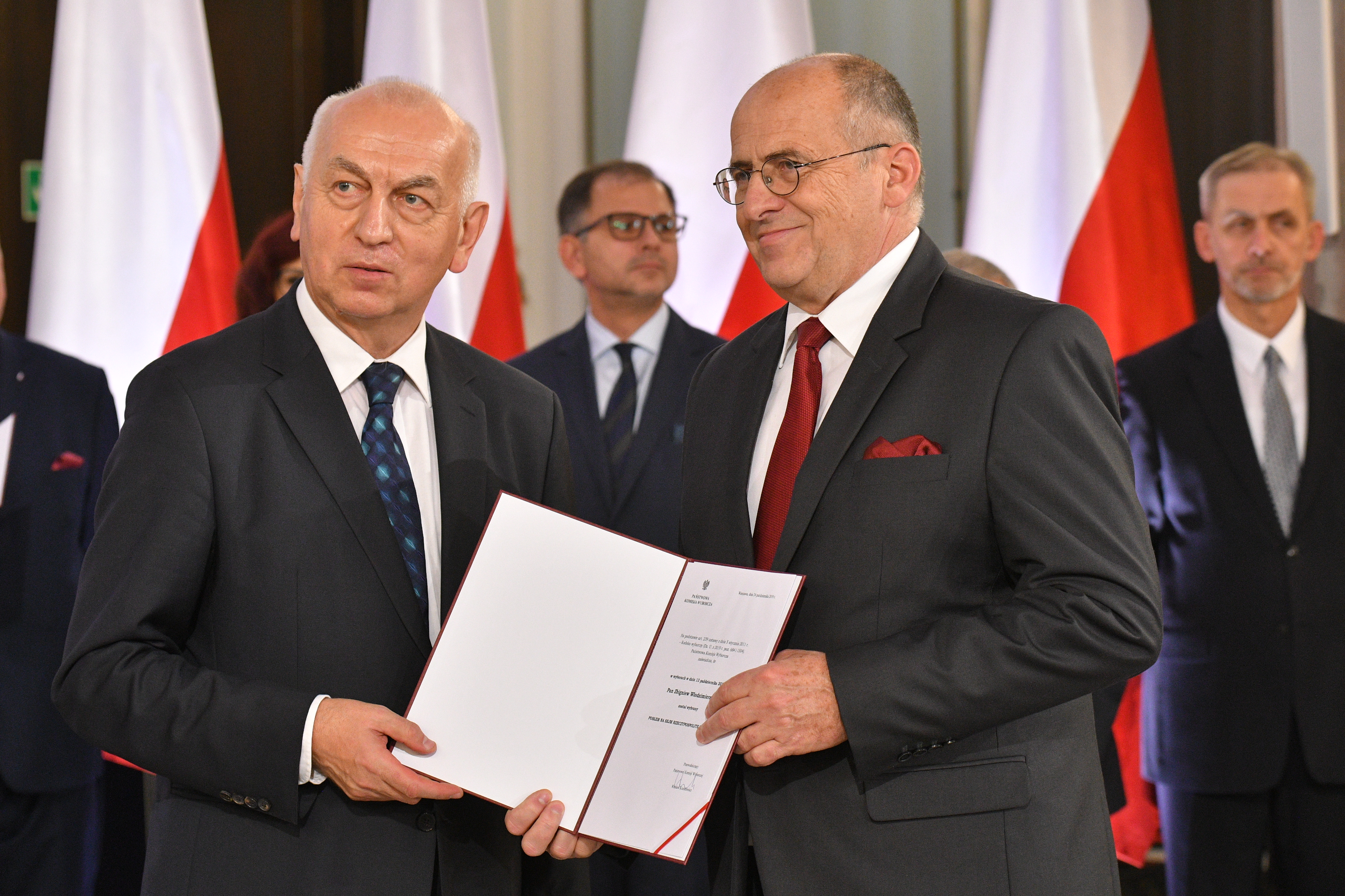 Zbigniew Rau, wręczenie nominacji poselskiej IX kadencji, po lewej Wiesław Kozielewicz.